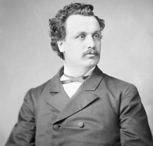 Flavien Dupont, M.P., (Bagit, P.Q.)